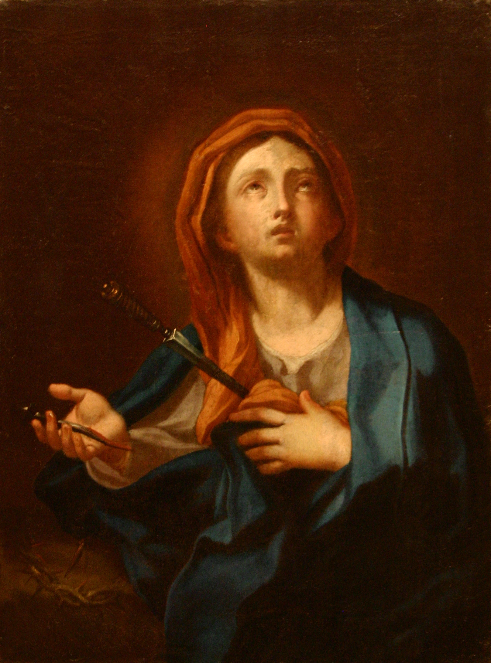 Museo Diocesano - Agrigento